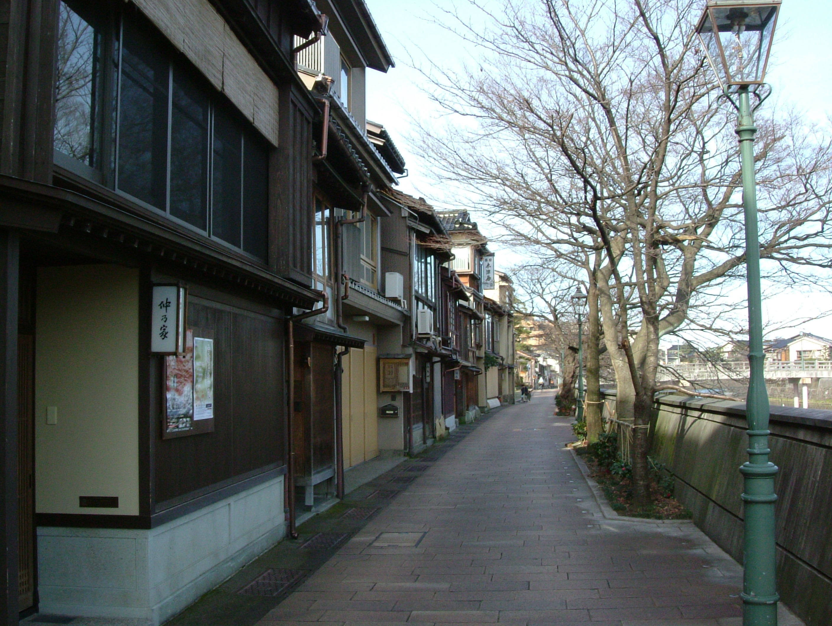 Kazuemachi in Kanazawa, Ishikawa, Japan